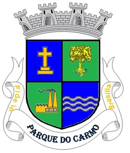 Escudo de Armas do Distrito de Parque do Carmo, São Paulo, Brasil